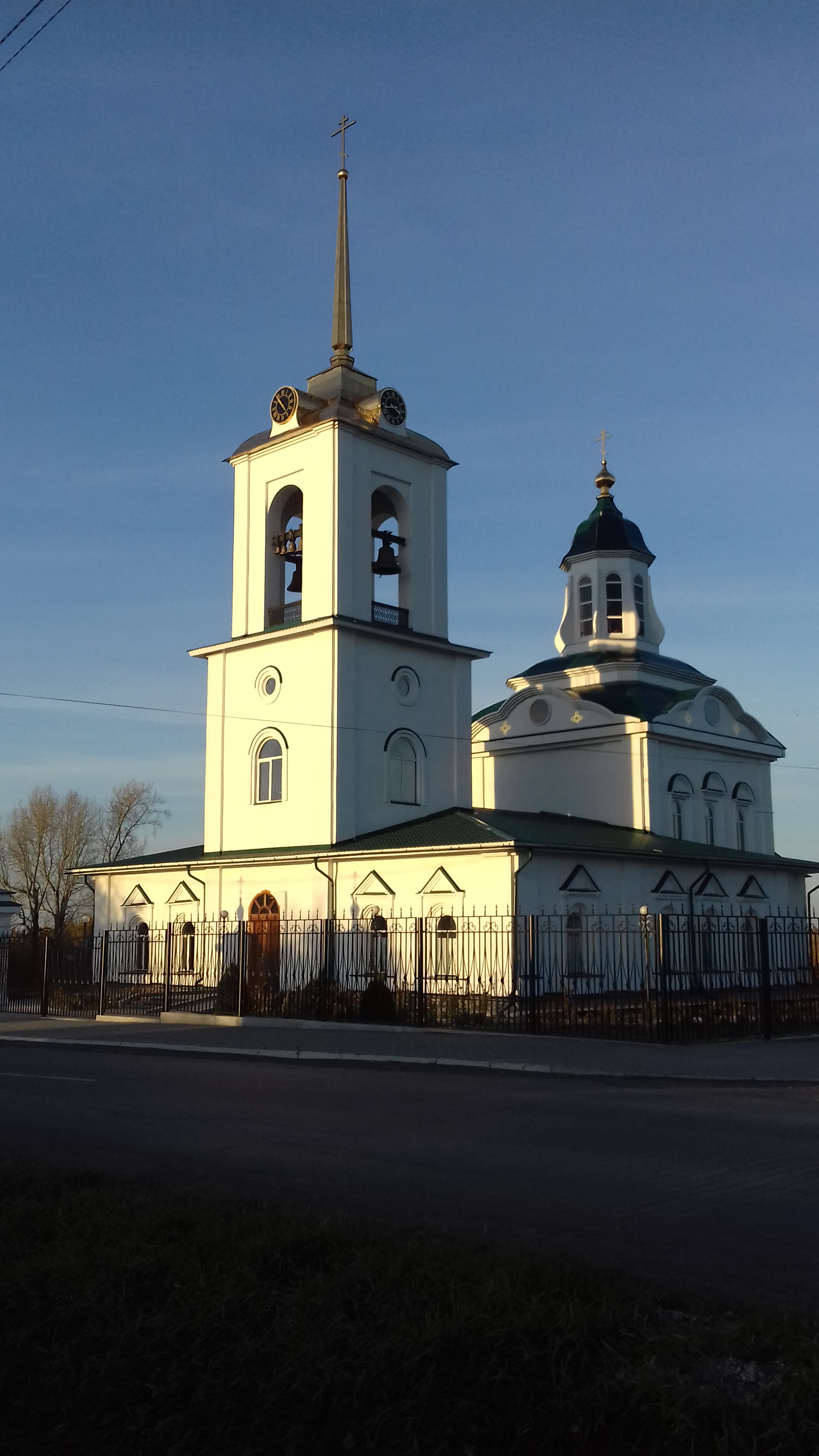 Храм Всемилостивого Спаса, современное состояние